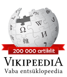 Eestikeelse Vikipeedia erilogo 200 tuhande artikli täitumise puhul augustis 2019.